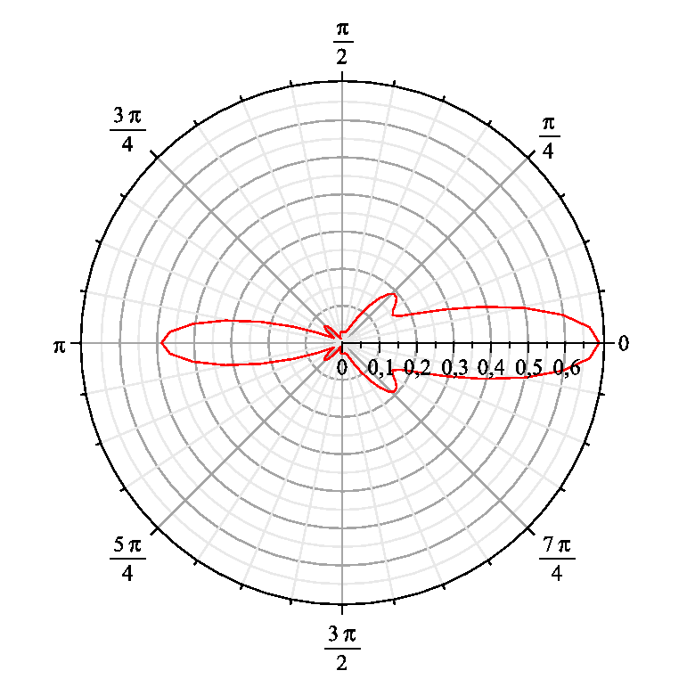 Diffusion de Mie